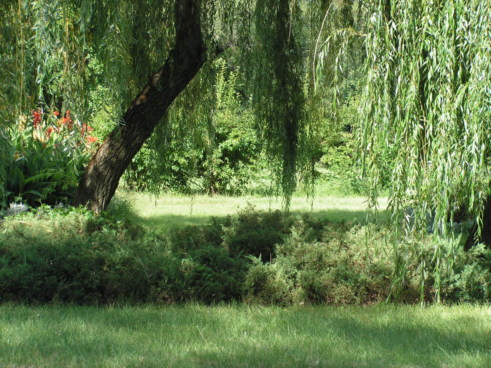 Hungary, Gyömrő, a Teleki kastély This is a photo of a monument in Hungary, Identifier: 7072